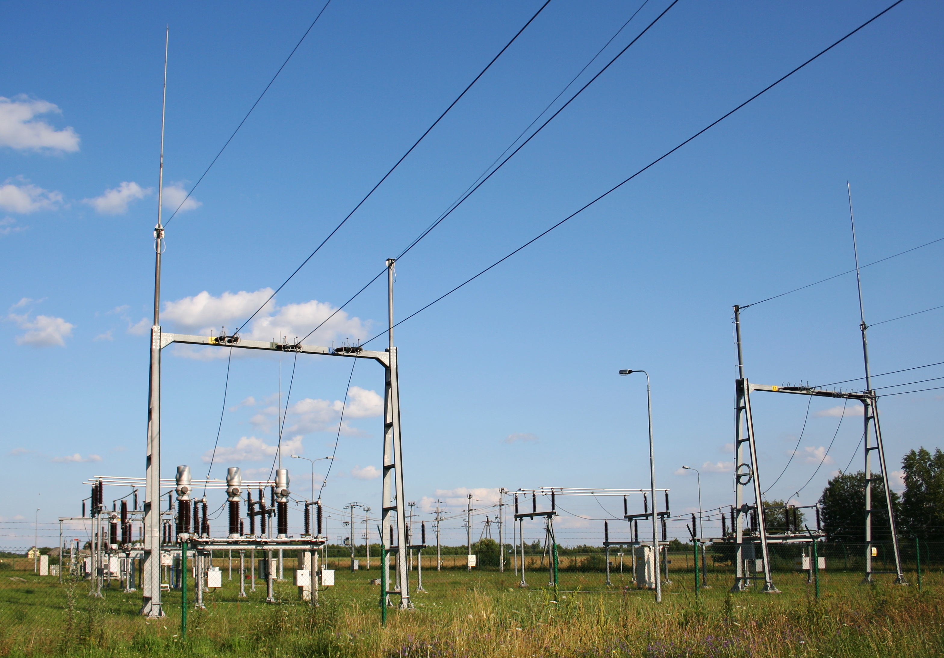 Stacja elektroenergetyczna (stacja transformatorowo-rozdzielcza ) 110/15 kv w Lewkowie, woj. podlaskie